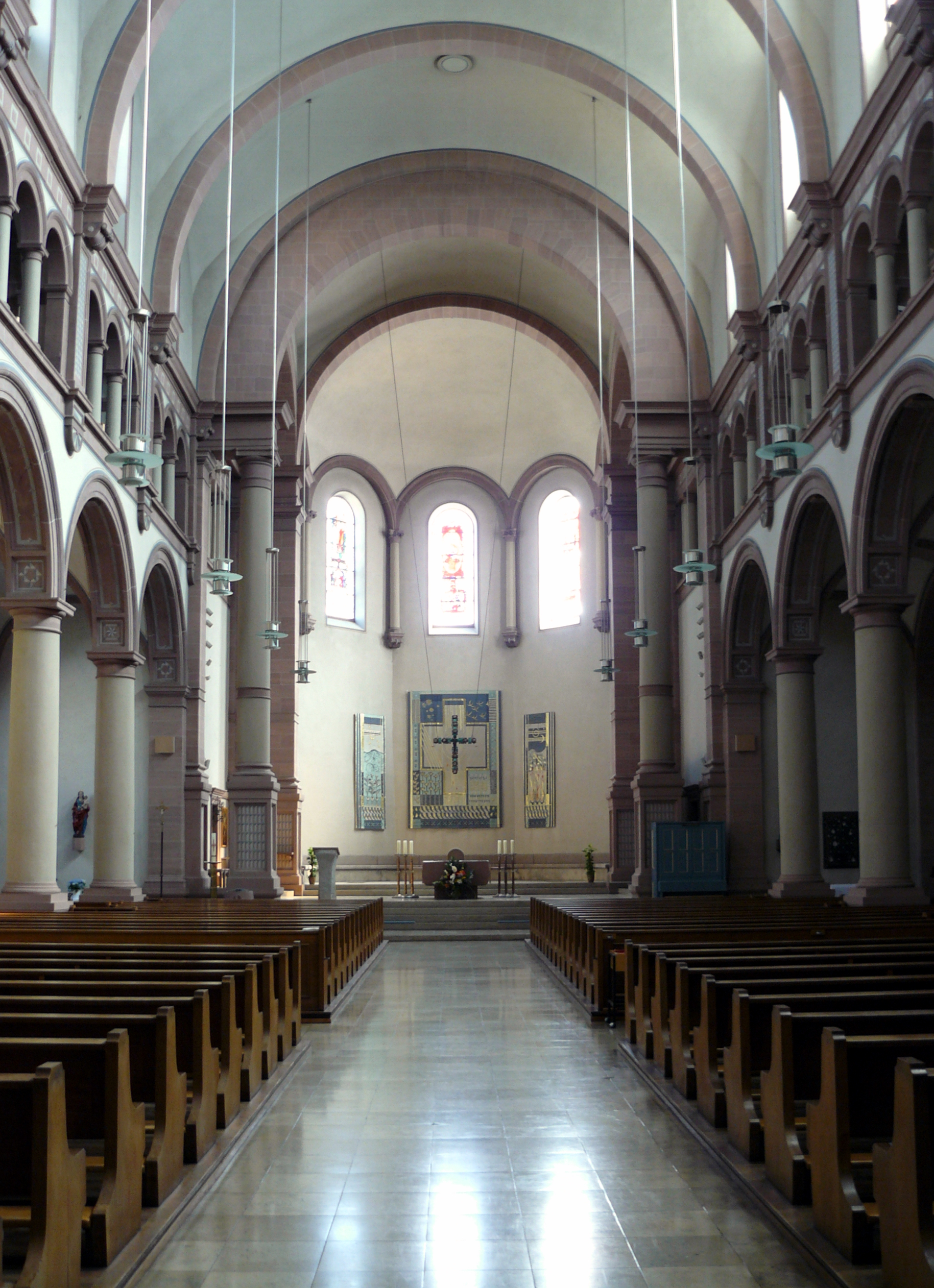 Chor der katholischen Franziskuskirche in Pforzheim